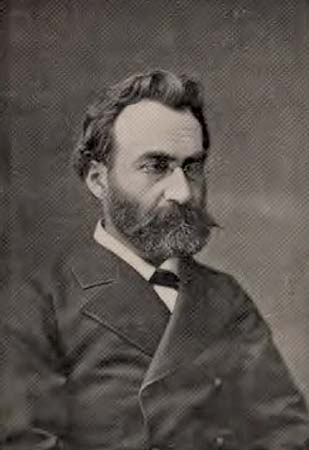 Армянский писатель Раффи (1835-1888)